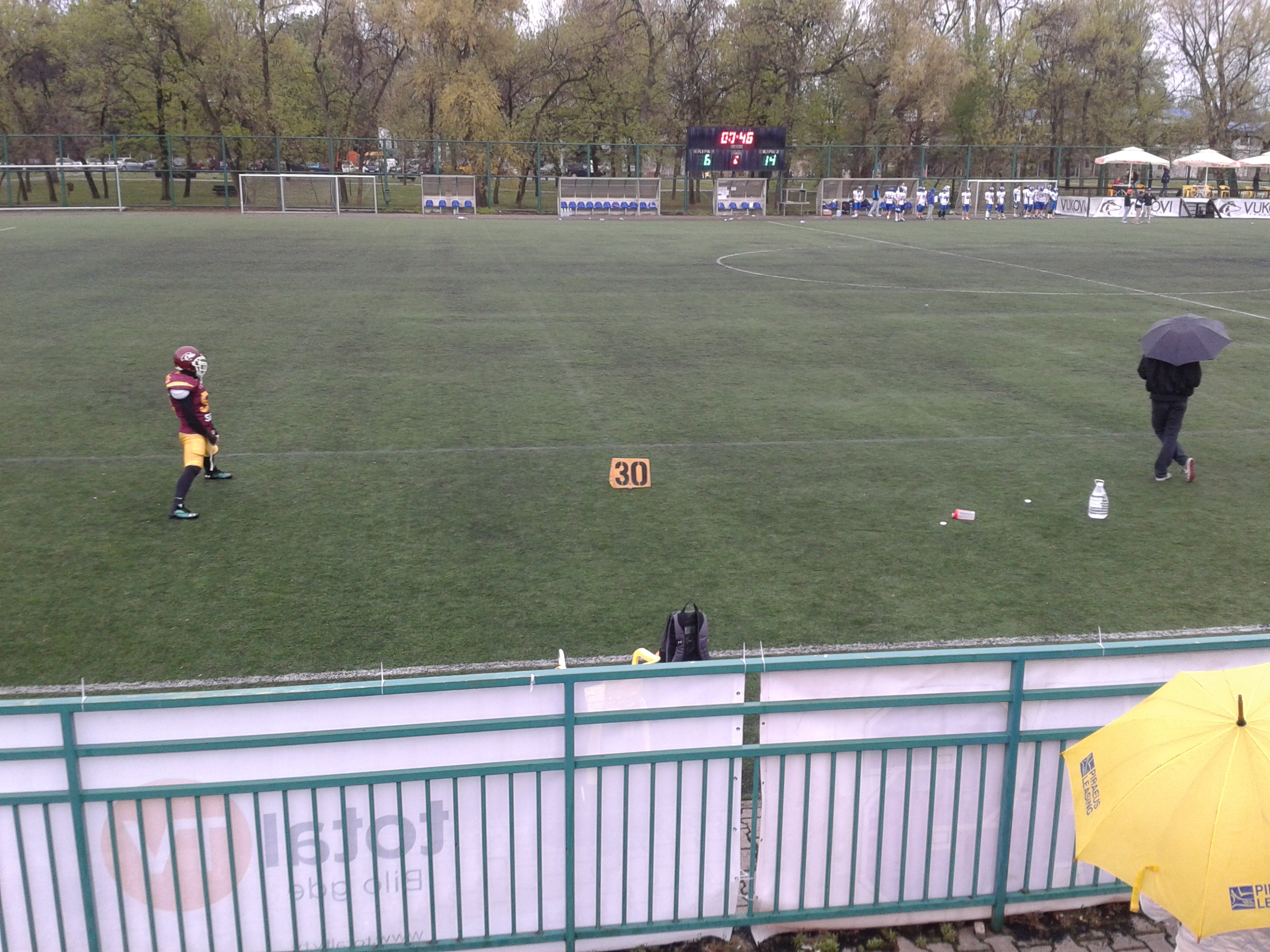 Српски (ћирилица): Стадион Ада Циганлија (Вукови Београд)